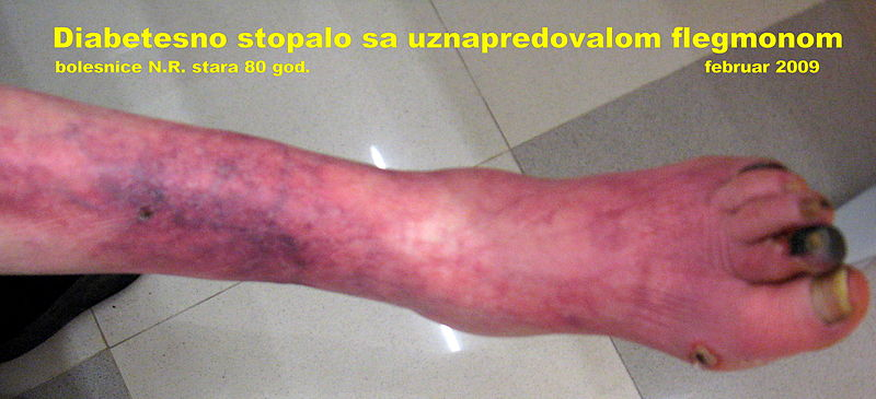 Сува гангрена прстију ноге са узнапредовалом флегмоном код дијабетесног стопала. Аутор др М. Димић; Intremedic-hbo, Ниш, 2009.